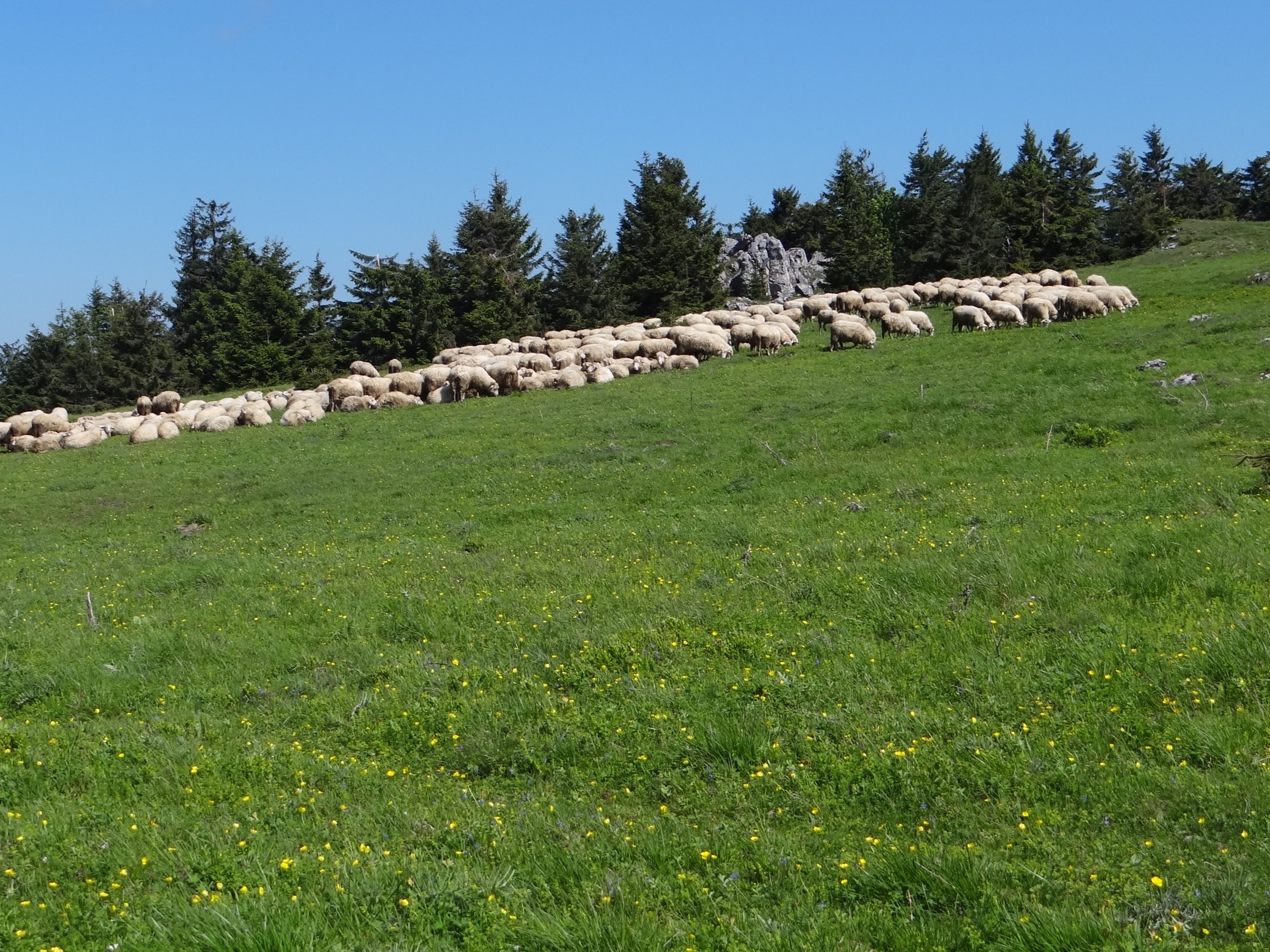 Koniarky